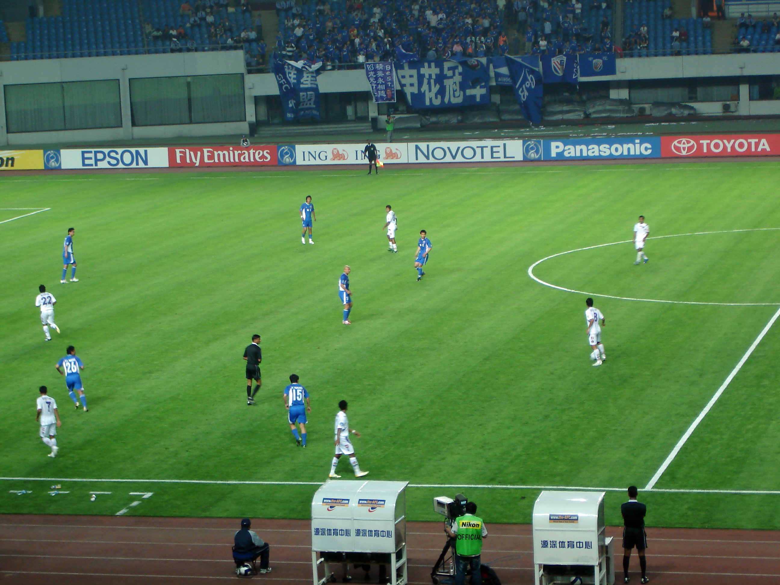 China: Spiel im Yuanshen Stadium zwischen Shanghai Shenhua und Persik Kediri in der AFC Champions League